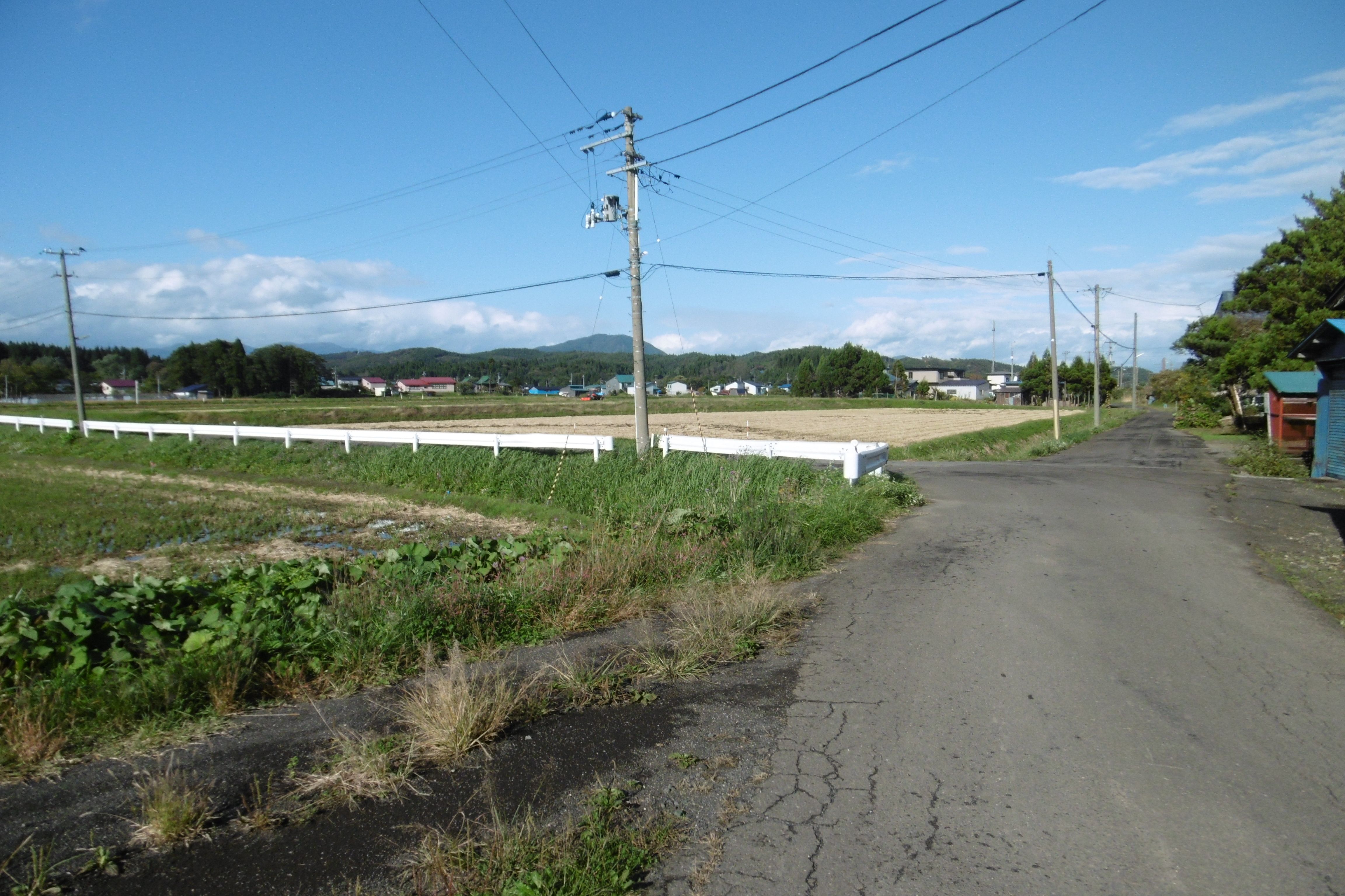 糠沢駅前の風景